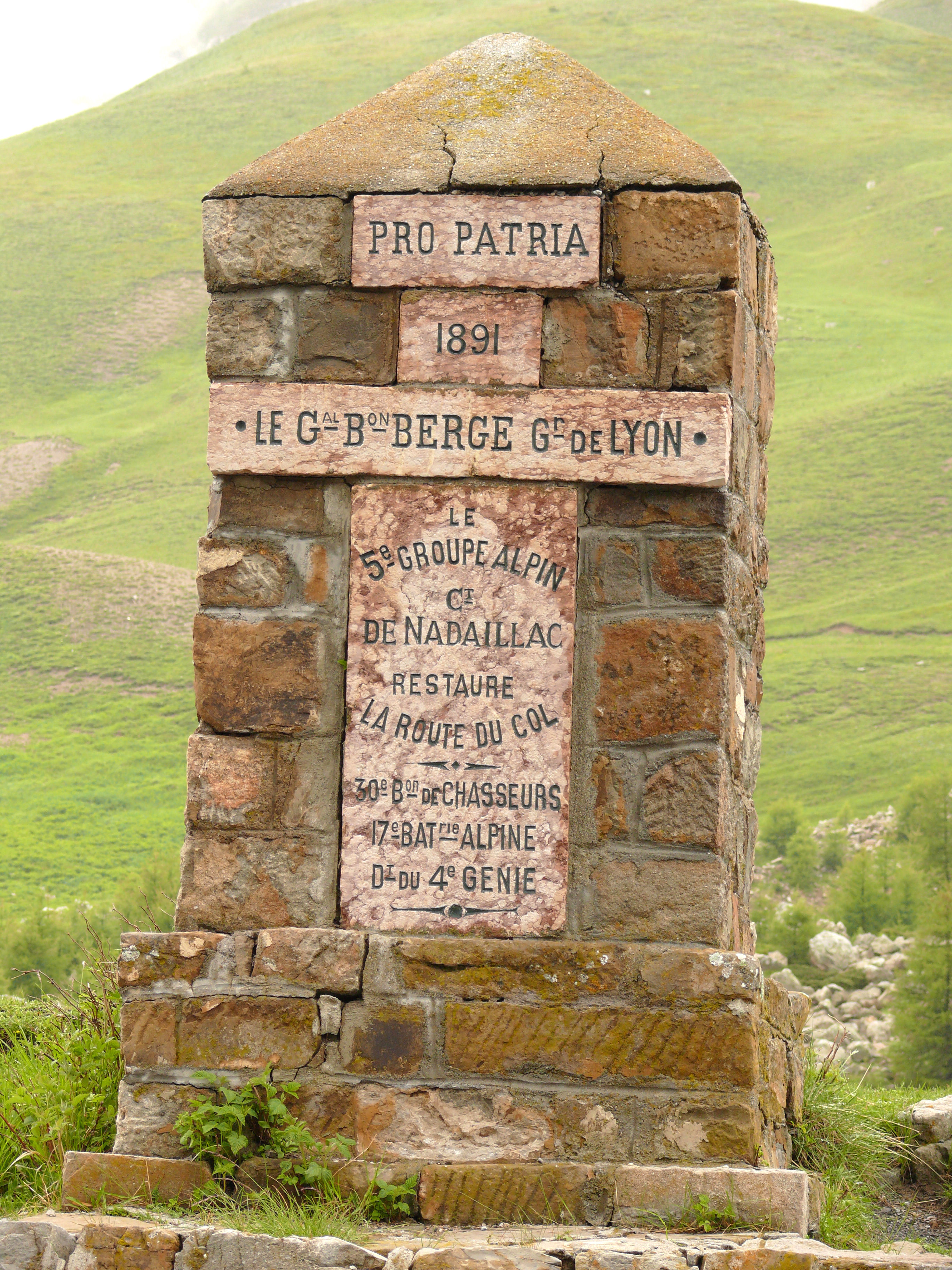 Col de Vars - Monument commémoratif